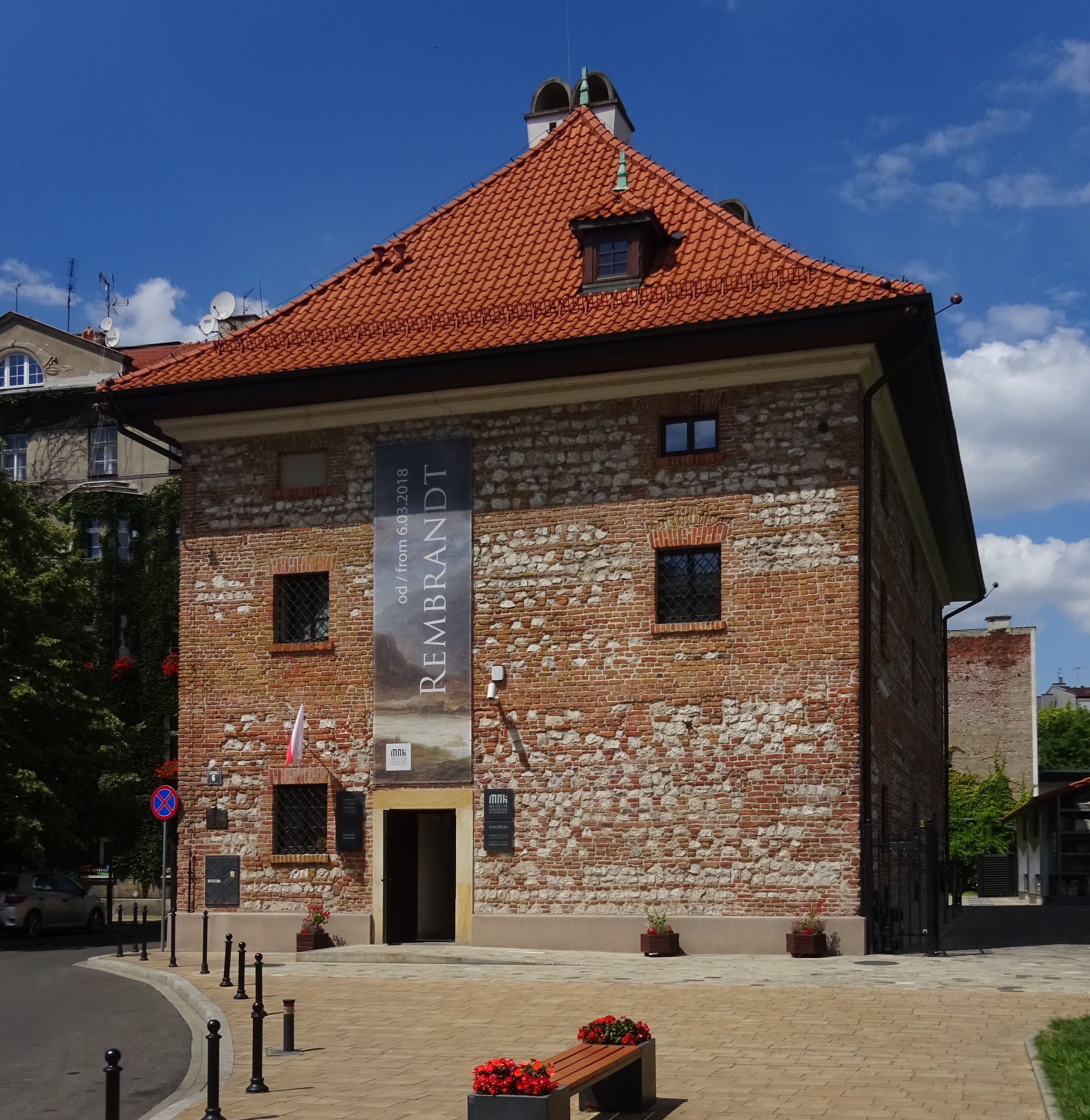 Stary Spichlerz w Krakowie na Placu Sikorskiego 6. Europeum - oddział Muzeum Narodowego w Krakowie.